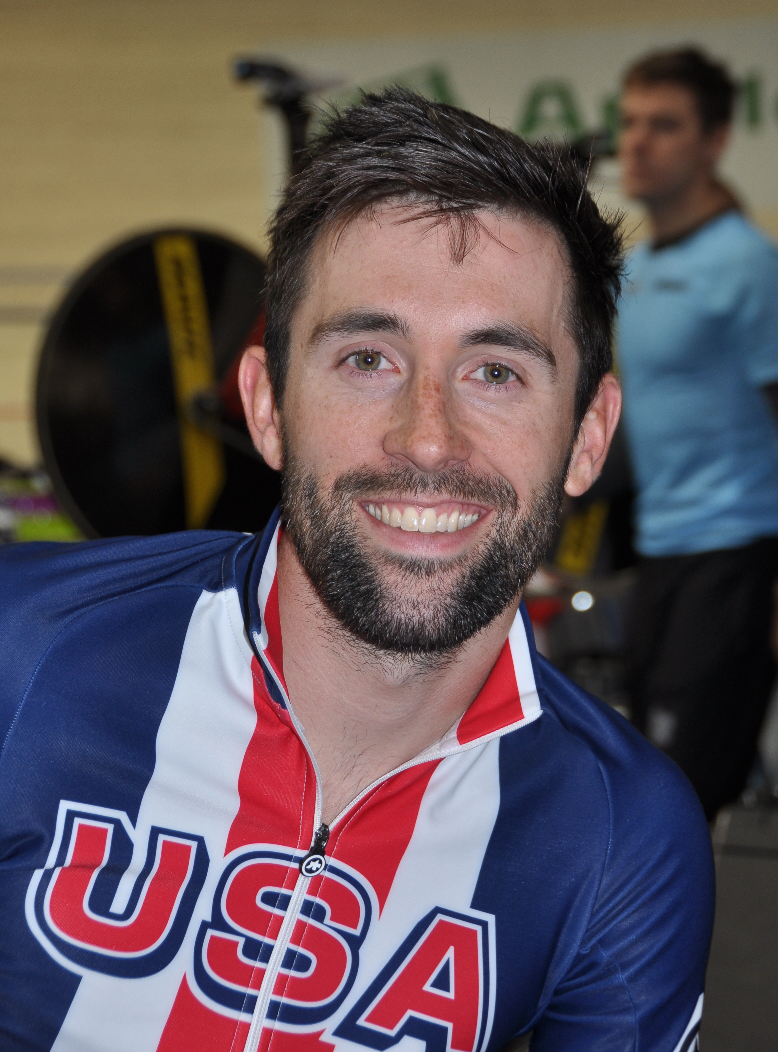 Eric Young, US-amerikanischer Radsportler